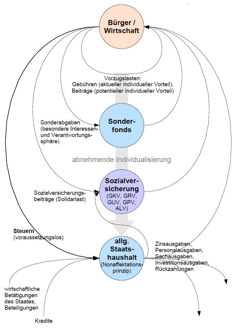 Übersicht über Abgaben und andere Staatseinnahmequellen sowie Sozialversicherung (Sozialversicherungsbeiträge stellen nach hM eine Abgabenart sui generis dar) die dargestellte Bezuschussung des Sozialversicherung aus den allgemeinen Staatsfinanzen = regelmäßig der größte Einzelposten dicke Linie: nichtsteuerliche Einnahmen des Staatshaushalts stellen aufgrund der in der Finanzverfassung vorausgesetzten Steuerstaatlichkeit die Ausnahme dar und sind besonders zu rechtfertigen die Sonderabgaben sind bspw. Filmabgabe der Kino- und Videowirtschaft (verpflichtet: Filmtheaterbetreiber, Videoprogrammanbieter; begünstigt: Drehbuchautoren, Produzenten, Verleiher, Filmtheater, kreativ-künstlerisches Personal der Filmwirtschaft, Videoanbieter, Videotheken, Fernsehveranstalter) oder Bahnpolizeiliche Ausgleichszahlung (verpflichtet: Eisenbahnen des Bundes; begünstigt: Bundespolizei) Autor: C.Löser Erstellt mit: de: Draw